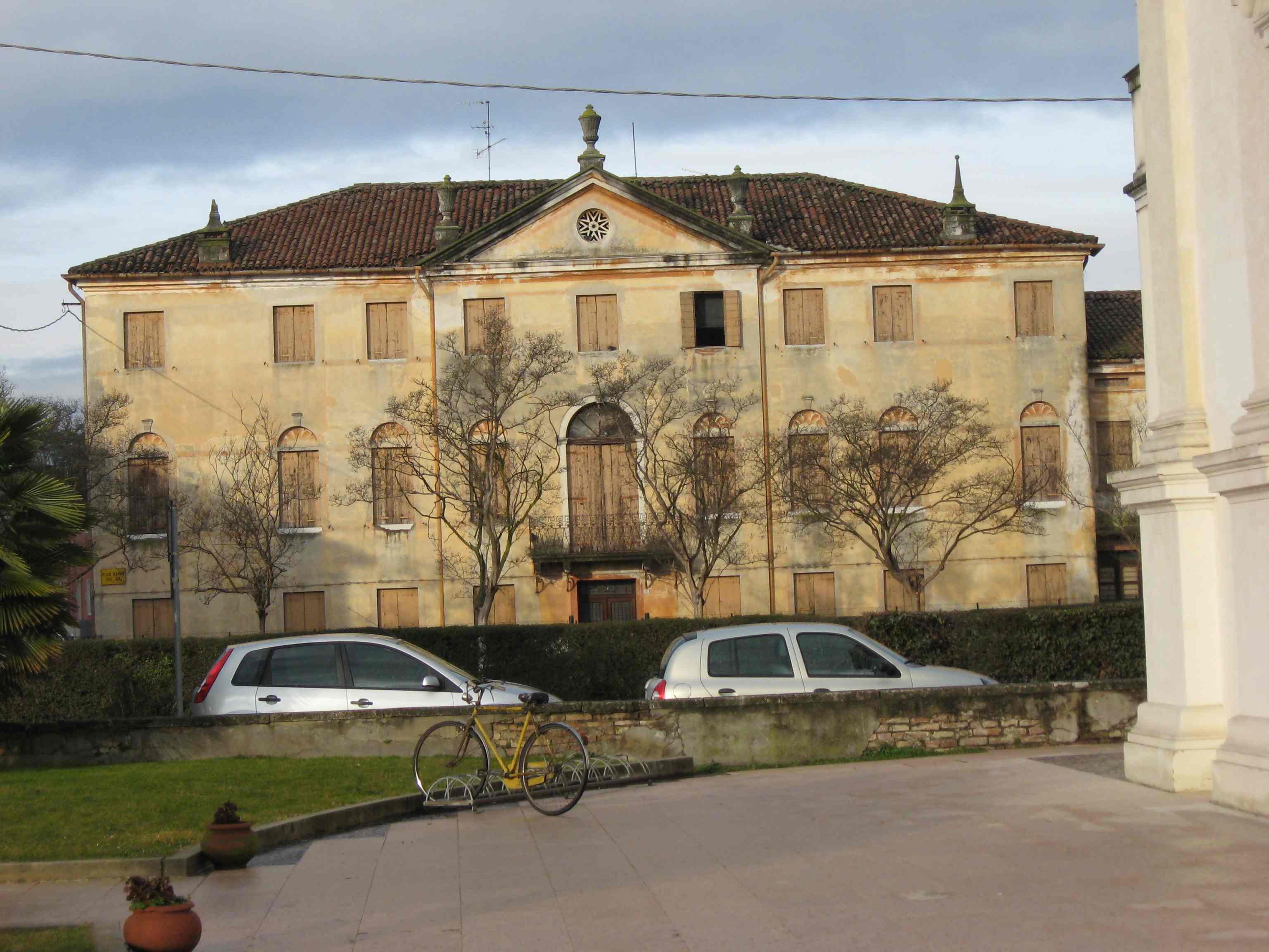 Villa Marani a Camposampiero (Padova)